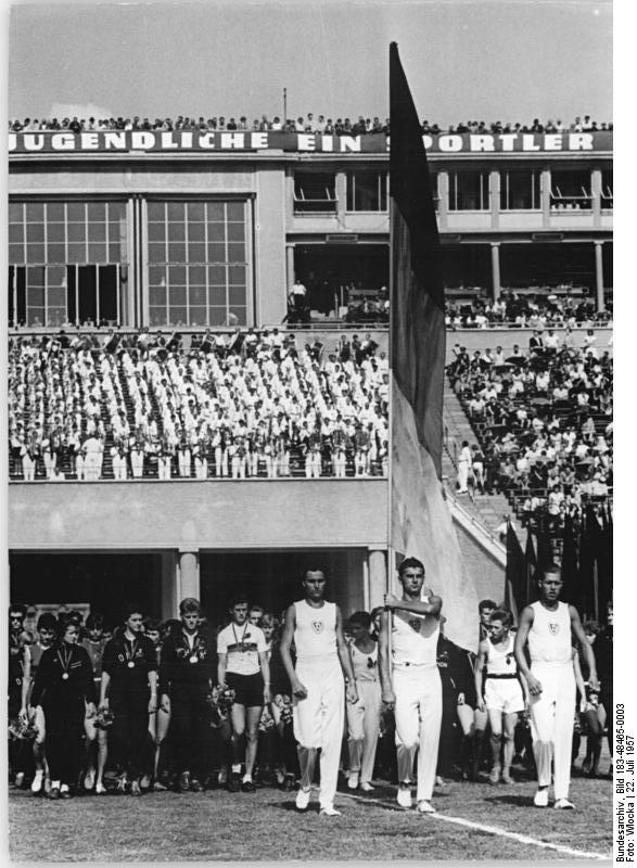 Leipzig, Turn- und Sporttreffen, Einmarsch Zentralbild Leipzig Son-Qu 22.7.1957 Turn- und Sporttreffen der Jugend in Leipzig. Einmarsch der besten Jugendsportler der DDR zur Siegerehrung. (Wlocka)